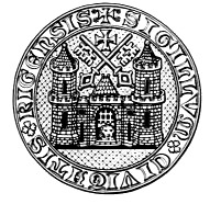 Altes Siegel der Stadt Riga